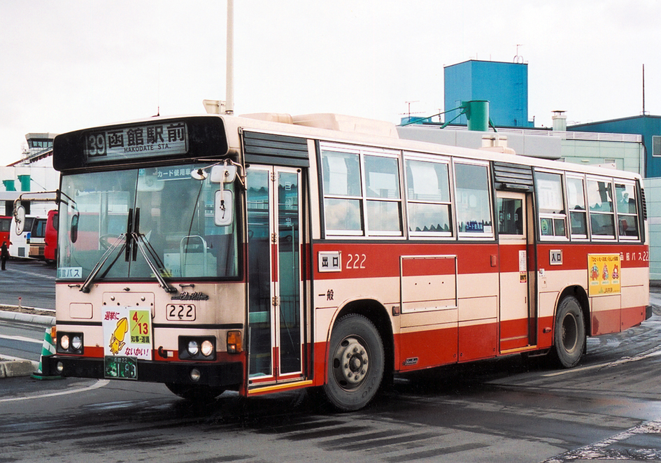 函館バス 日野・ブルーリボン P-HU275 元函館市交通局車